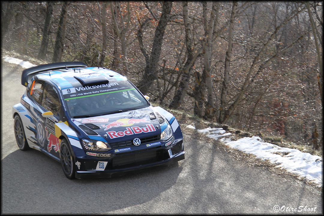 Andreas Mikkelsen podczas OS 3 Rajdu Monte Carlo 2016